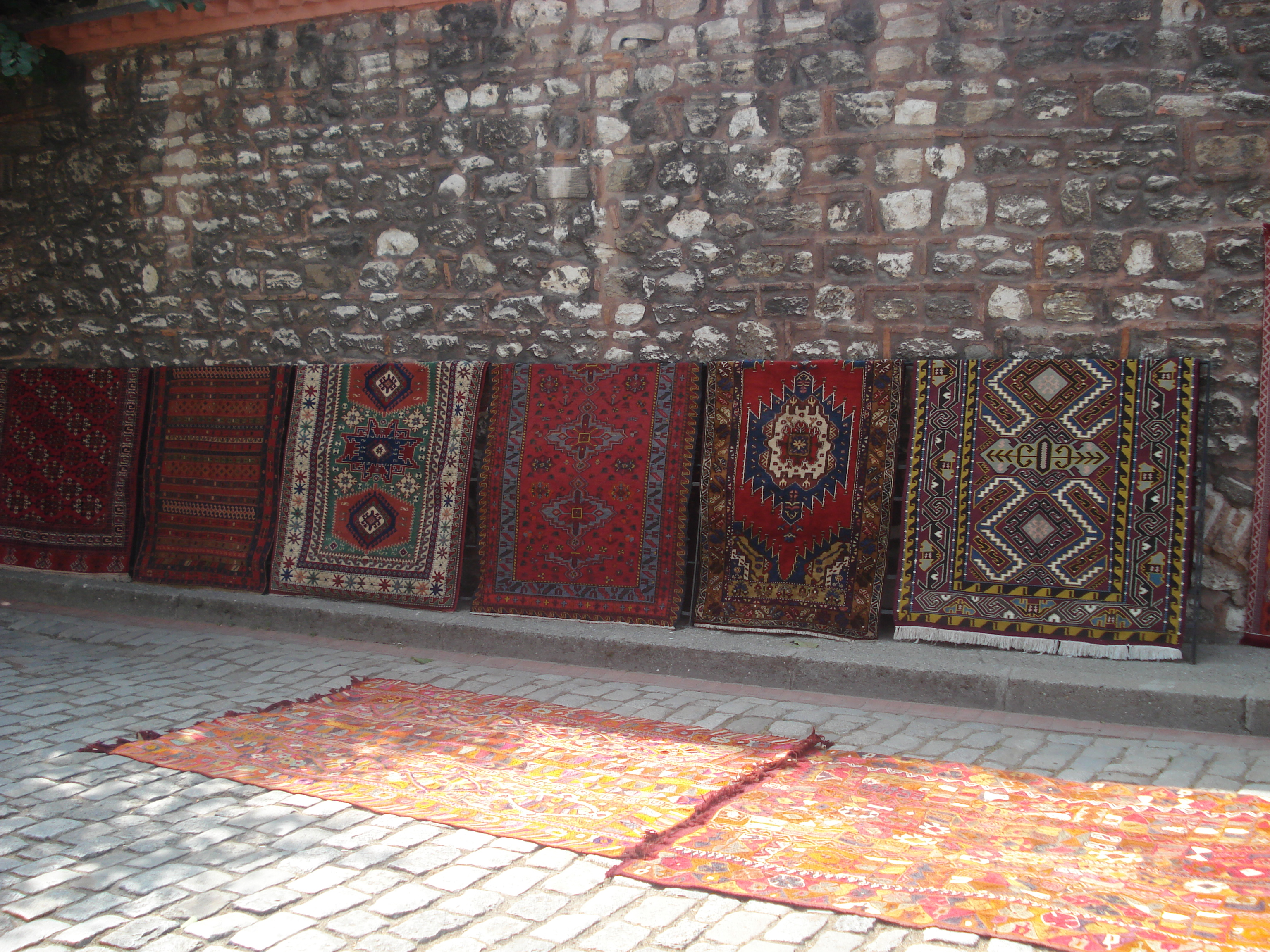 Turkish kilims